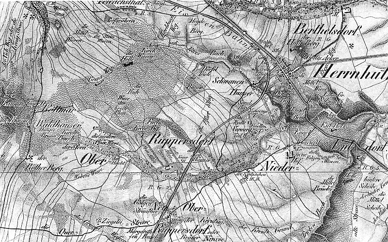 Original image description from the Deutsche FotothekHerrnhut-Ruppersdorf/O.L.. Oberreit, Sect. Zittau, 1844/46